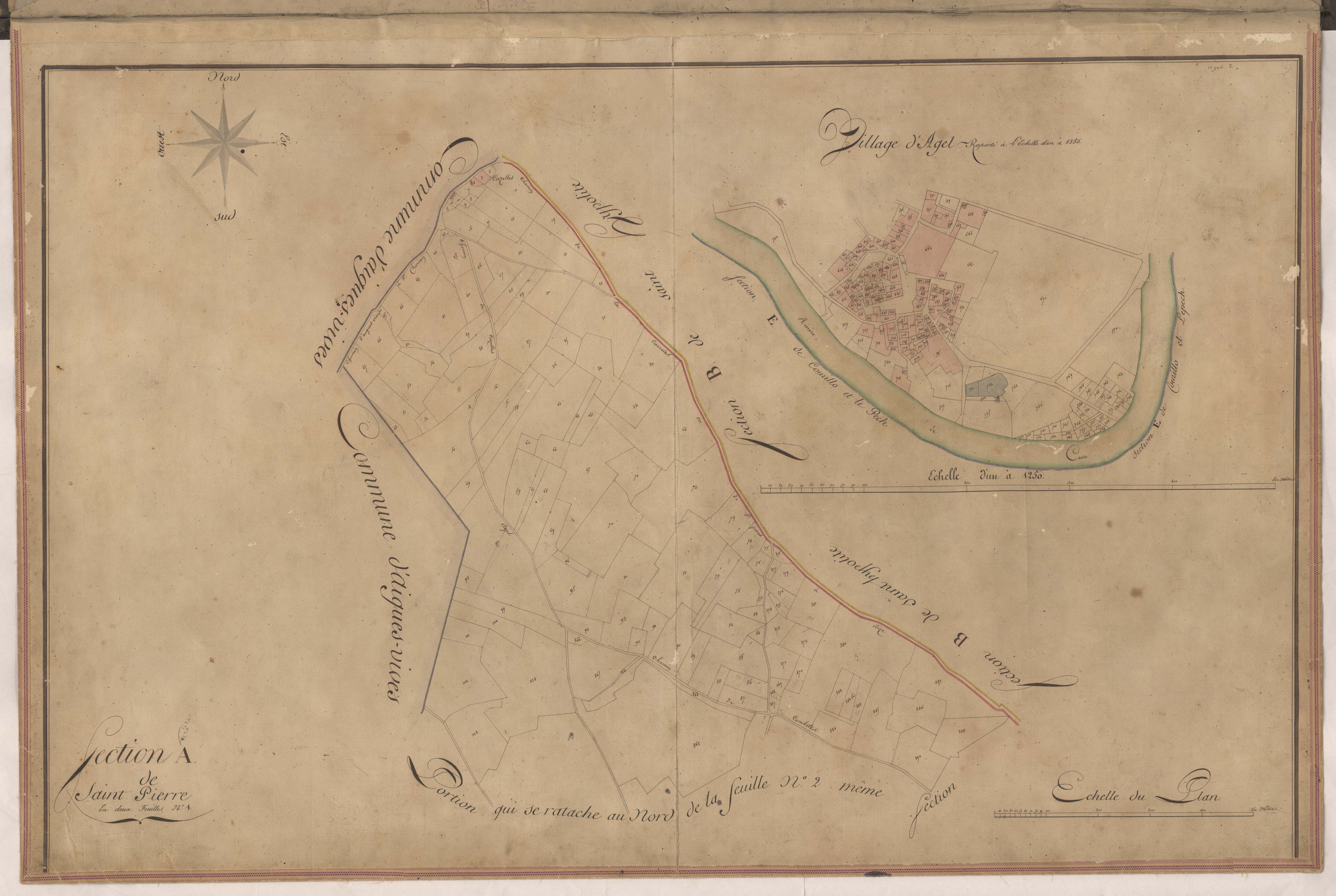 Agel. - Cadastre napoléonien : plan de la section A1 de Saint-Pierre